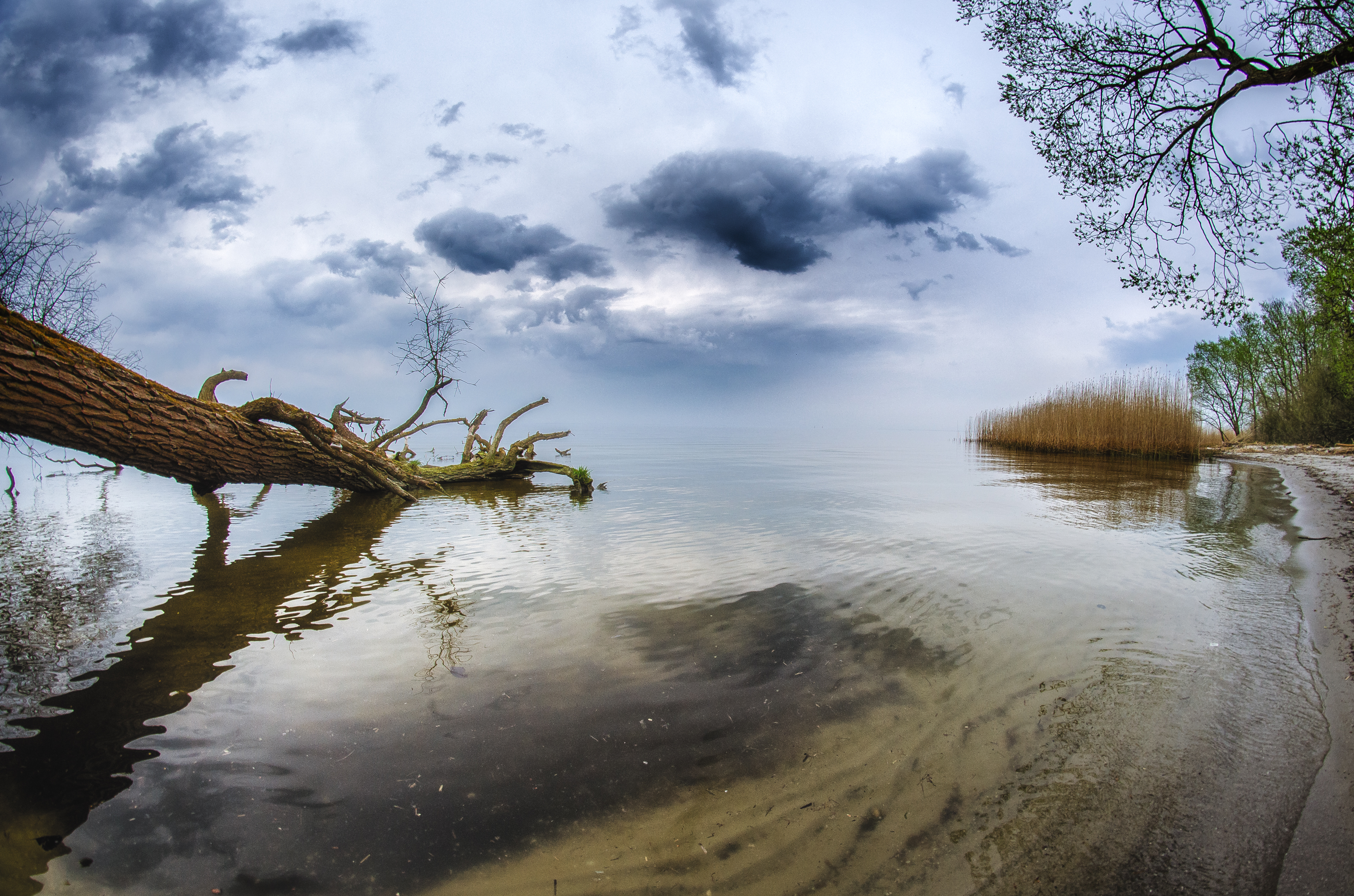 Obszar specjalnej ochrony ptaków Zalew Szczeciński. This is a photography of Natura 2000 protected area with ID PLB320009